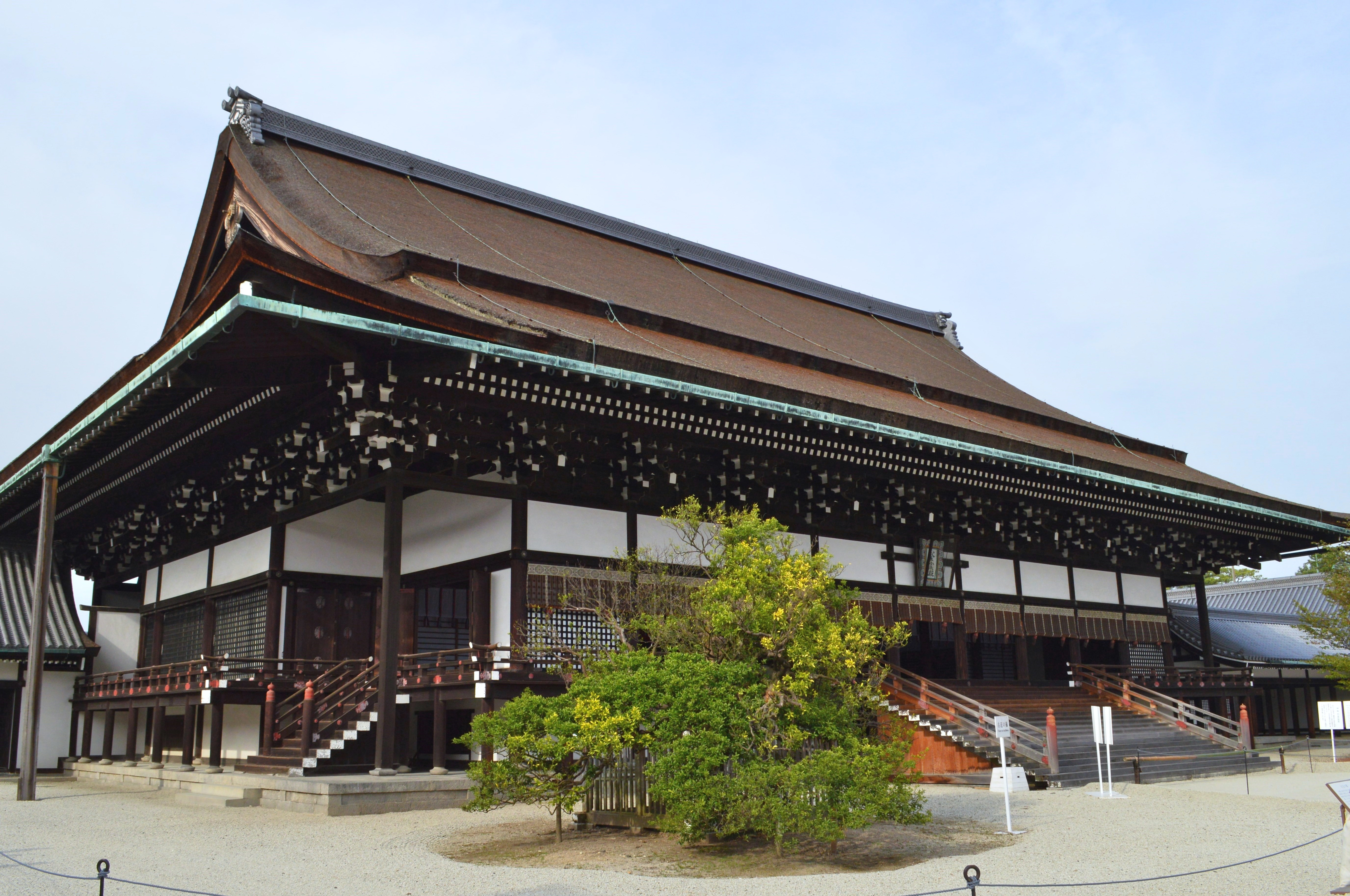 京都御所 紫宸殿